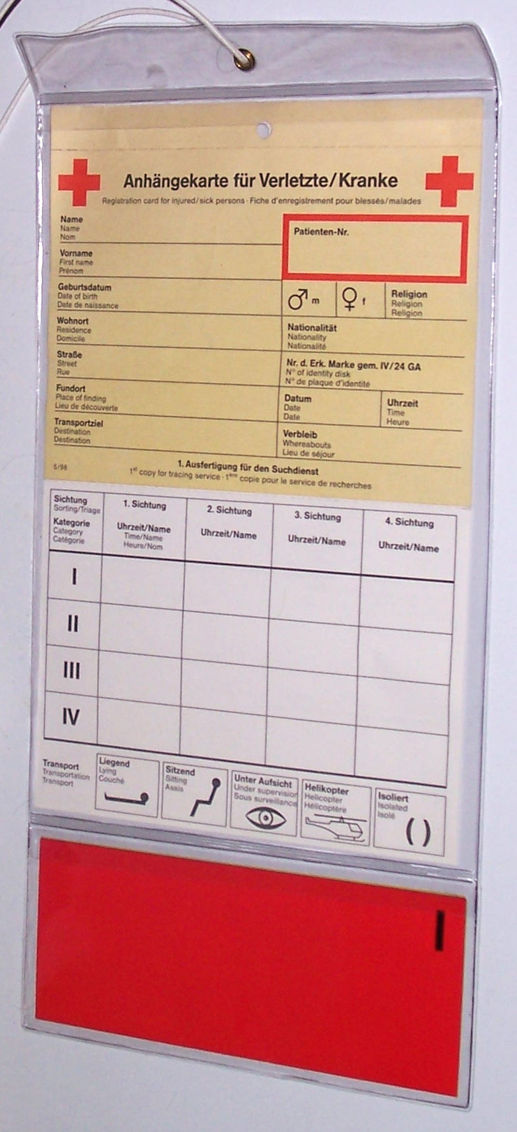 Eine Verletztenanhängekarte des DRK. Vorderseite Fotograf oder Zeichner: Sven Tombers Datum: 2.9.2005